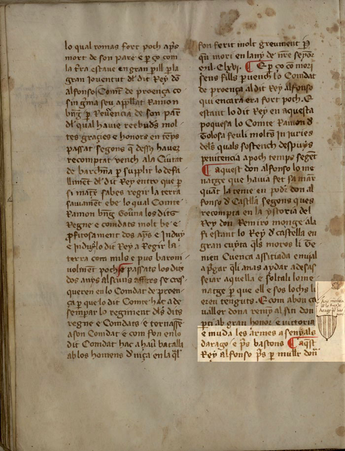 mudó las armas e seynnales de Aragón e prendió bastones. Crònica de San Juan de La Penya o Crónica de los Reyes de Aragón i condes de Barcelona. Versión en catalán